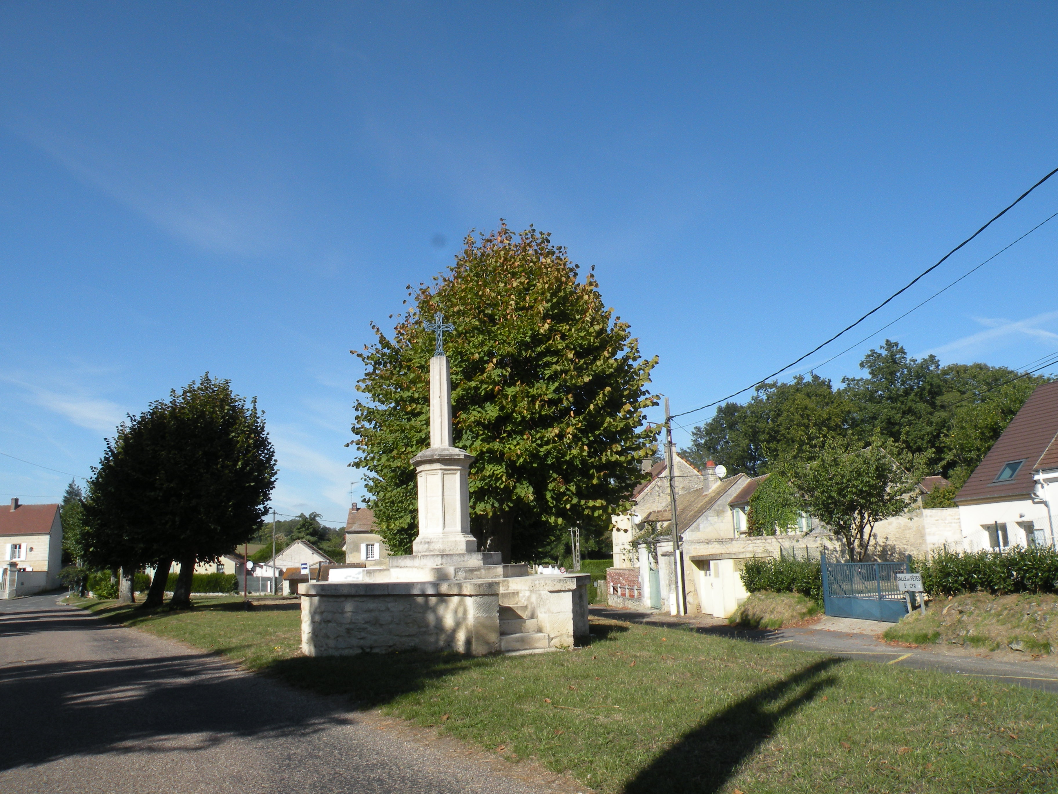 calvaire Hadancourt-le-Haut-Clocher